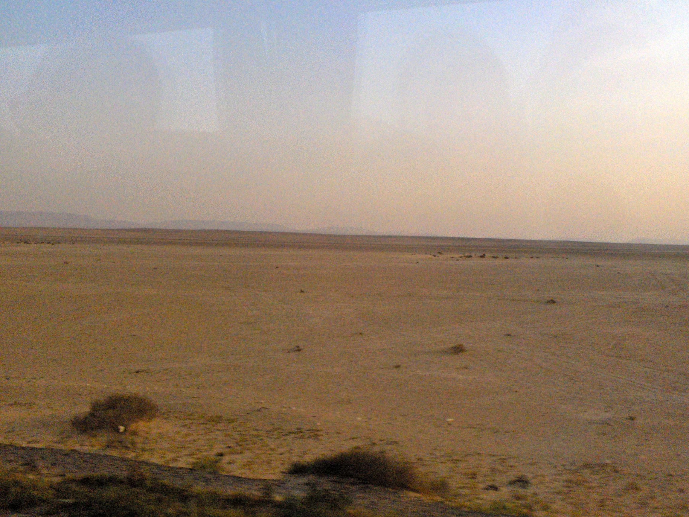 Deserto a Palmira, Siria